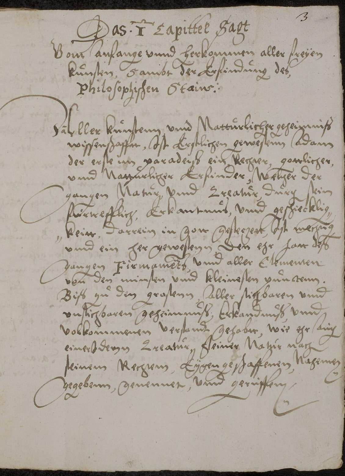 Codex Palatinus germanicus 600, "Aurora Philosophorum", Blatt 3r der Handschrift.